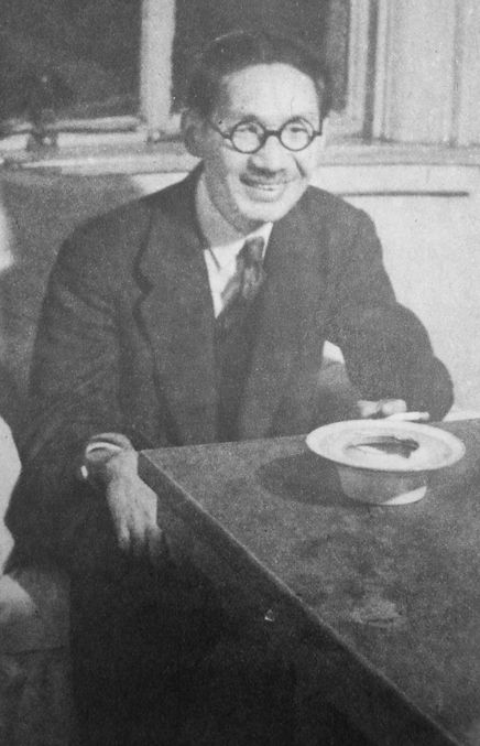 米川正夫